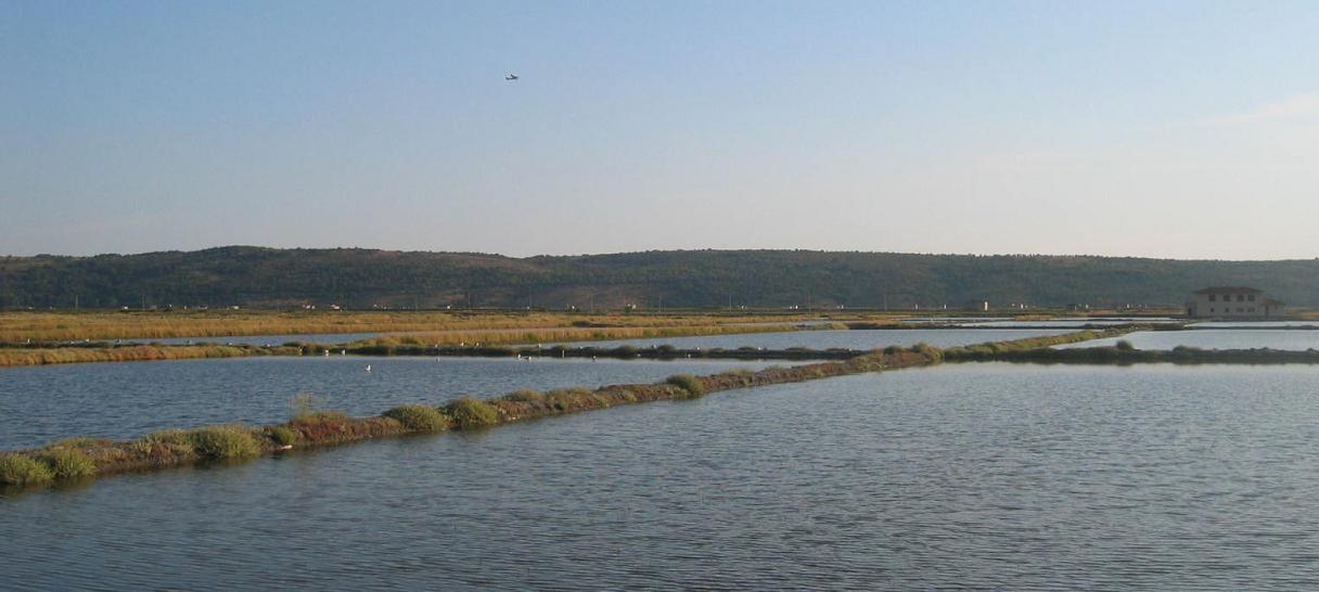 Salt works at Sečovlje, Slovenia photo:Ziga 06:02, 21 August 2006 (UTC)